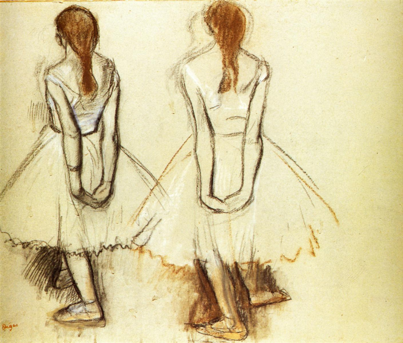 Vorstudien zur Skulptur "La Petite Danseuse de quatorze ans"